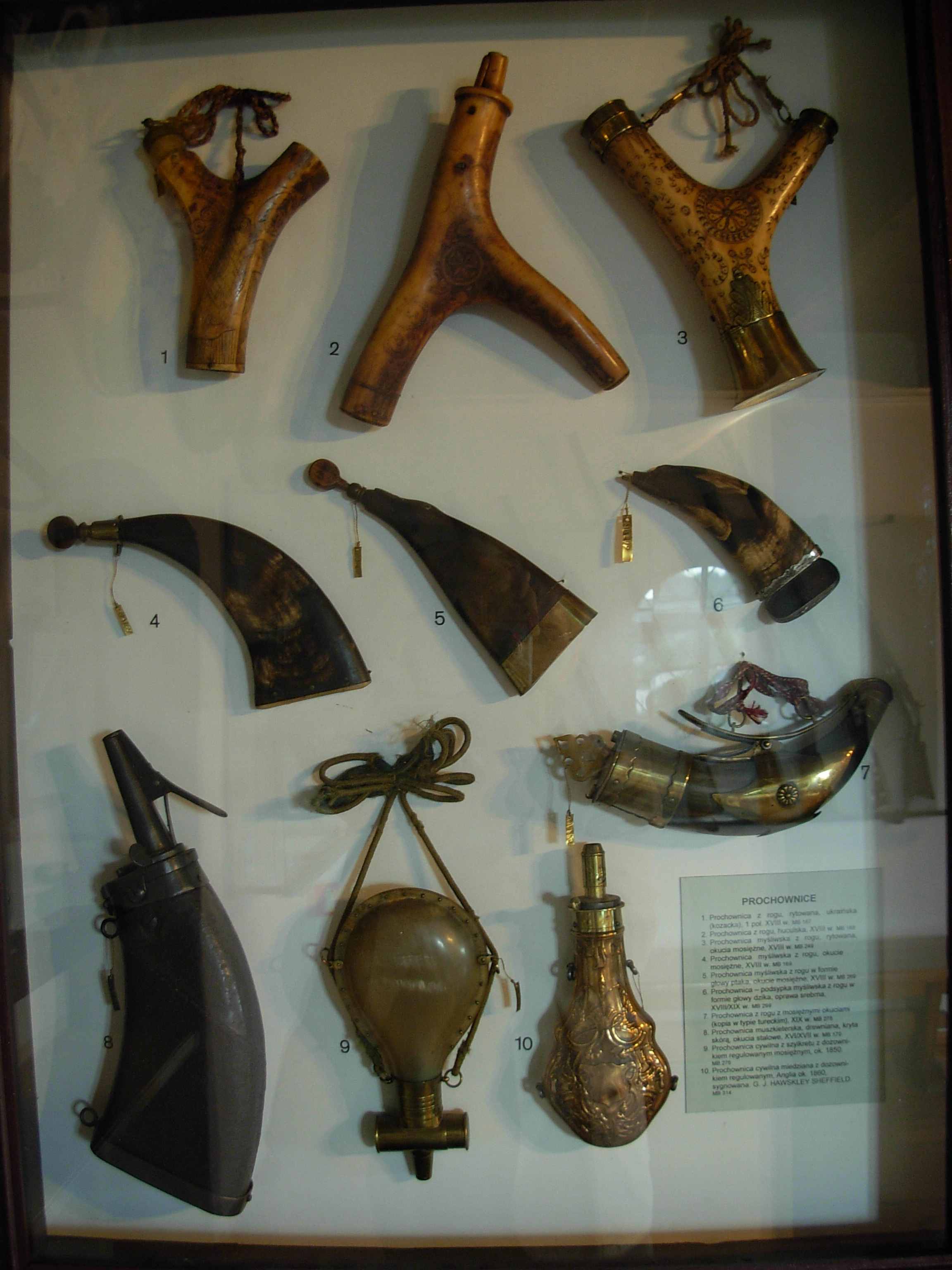 Items from Muzeum Zagłębia, in Castle in Będzin, Poland.